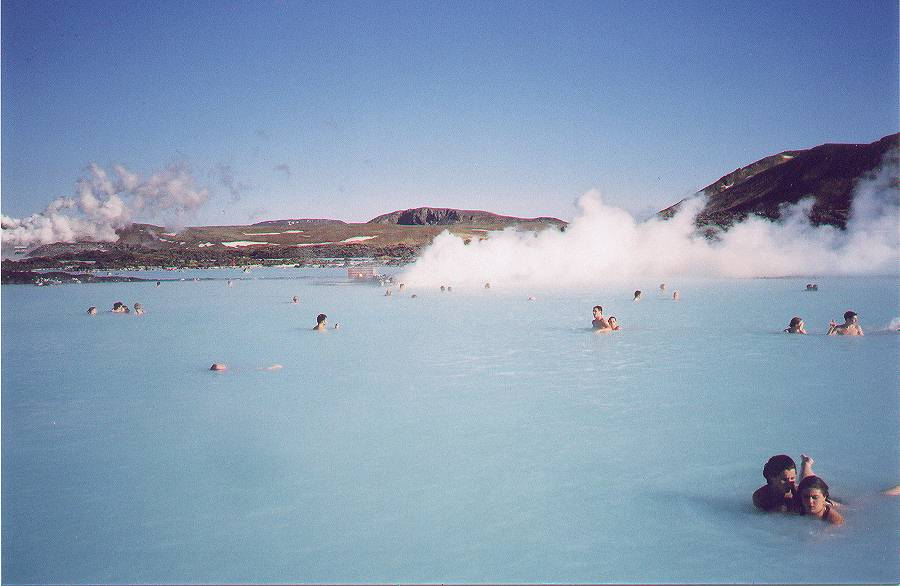 Blue Lagoon/Bláa Lónið, Iceland